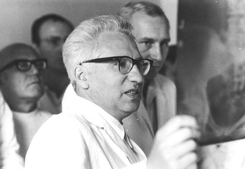 Berlin-Friedrichshain, Prof. Dr. Moritz Mebel Zentralbild Koard 24.3.71 Berlin: Medizinalrat Prof. Dr. habil. Moritz Mebel (geb. 23.2.1923), Chefarzt im Krankenhaus Friedrichshain. 1970 wurde er mit dem Vaterländischen Verdienstorden in Gold ausgezeichnet. Genosse Mebel ist Abgeordneter der Stadtverordnetenversammlung von Groß-Berlin. Abgebildete Personen: Mebel, Moritz Prof. Dr. med.: Vorsitzender des Komitees Ärzte zur Verhütung eines Nuklearkrieges, DDR (GND 121117227)